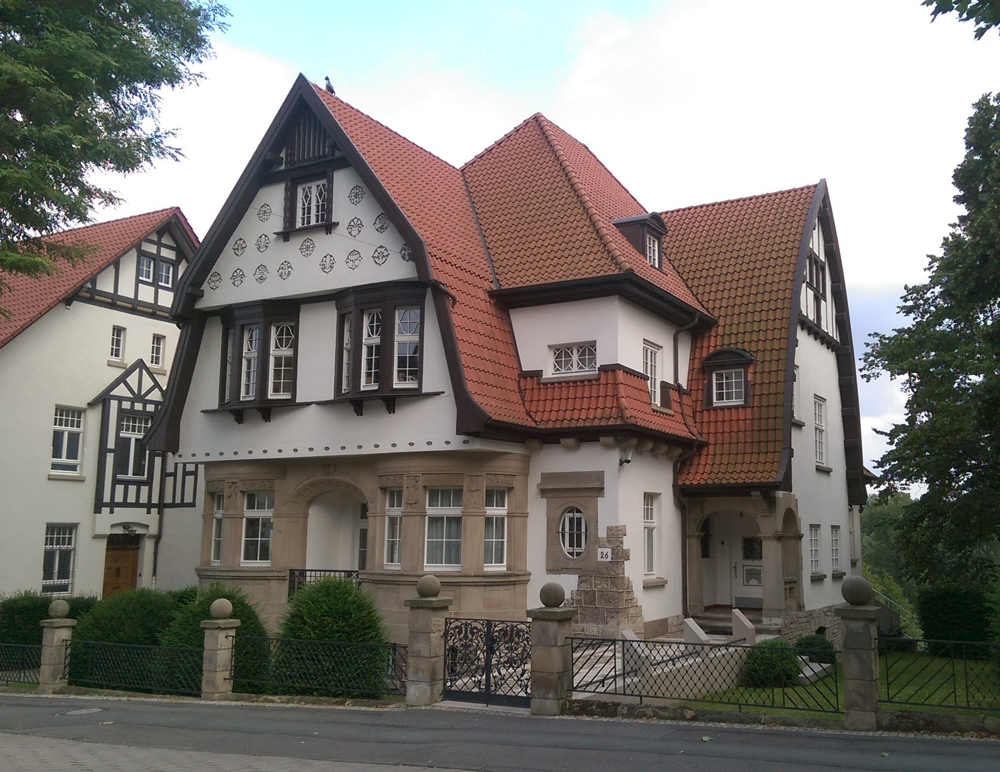 Jugendstilvilla Kasseler Straße 26 in Warburg (ehem. Eigentümer: Hugo und Mary Berg)